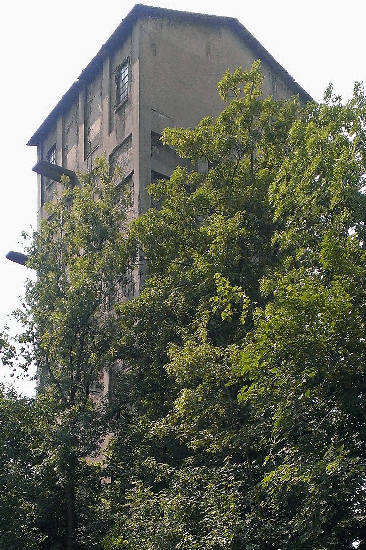 Zeche Eintracht Tiefbau, Kokskohlenturm am Schacht Heintzmann in der Alleestraße in Essen-Freisenbruch